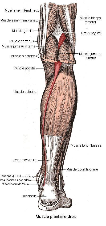 Muscle plantaire. Anatomie humaine